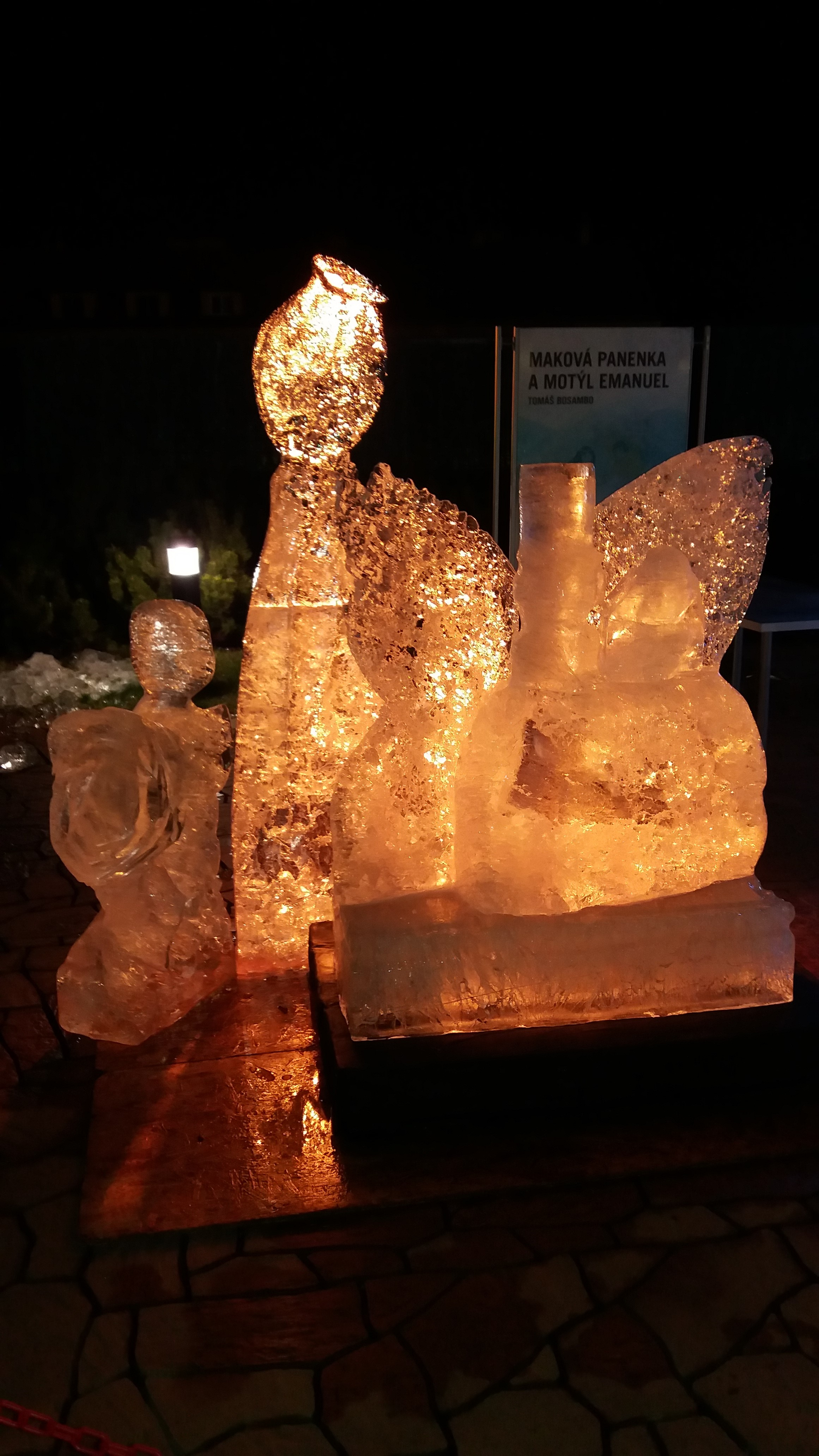 Postavičky makové panenky a motýla Emanuele vytvořené z ledu na Festivalu ledových soch na střeše pražského nákupního centra Galerie Harfa.